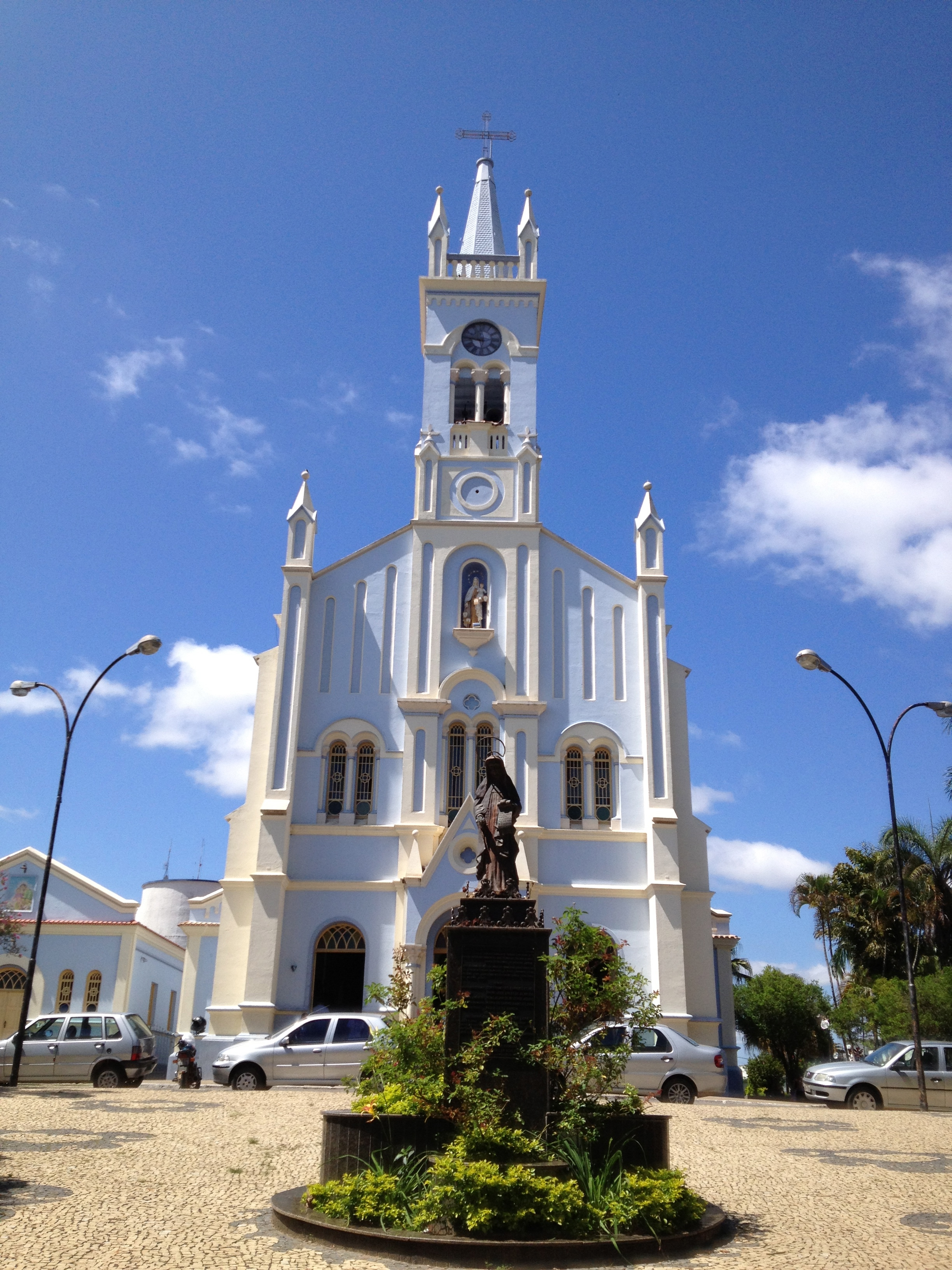 Igreja N. Senhora do Carmo - Carmópolis de Minas MG